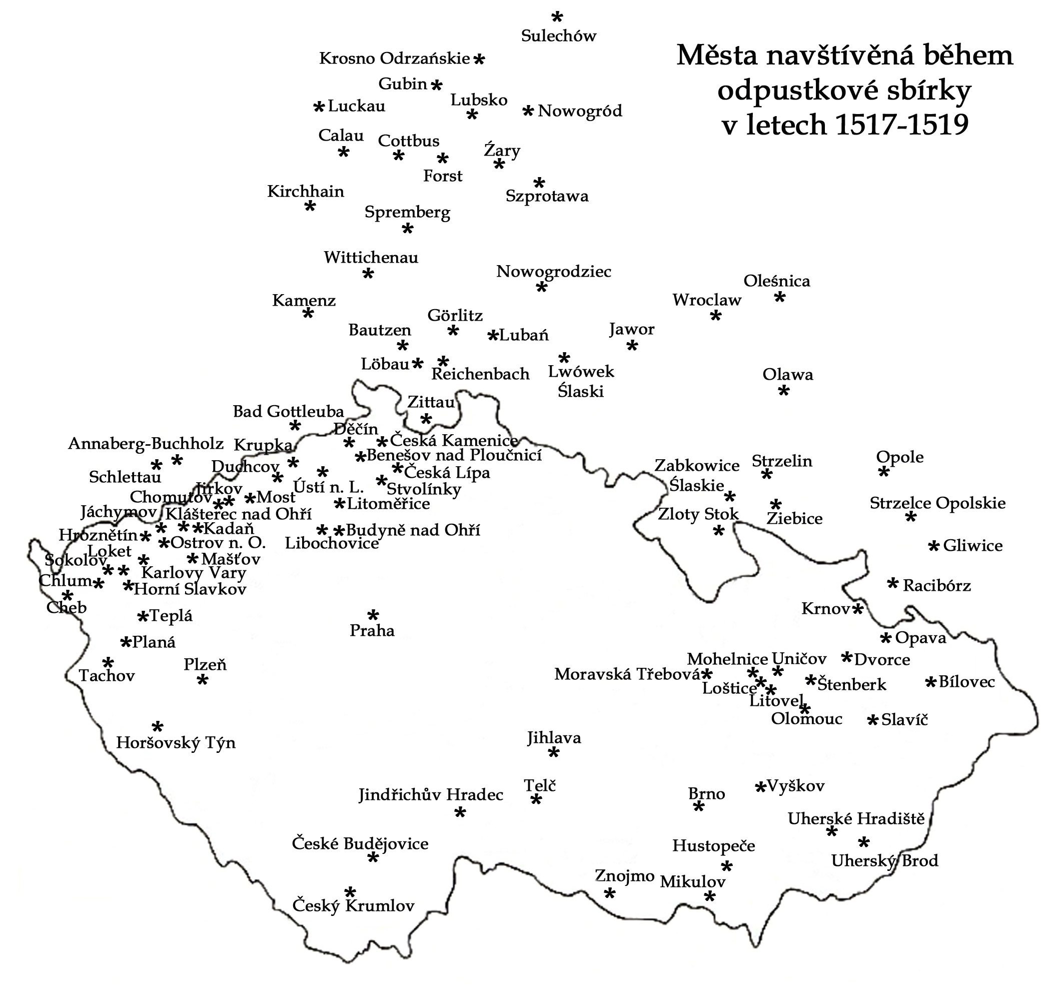 Die Karte der Kirchensammlung für die Kirche Maria Himmelfart in Most (Brüx).